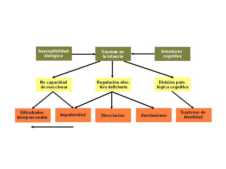 Modelo TLP